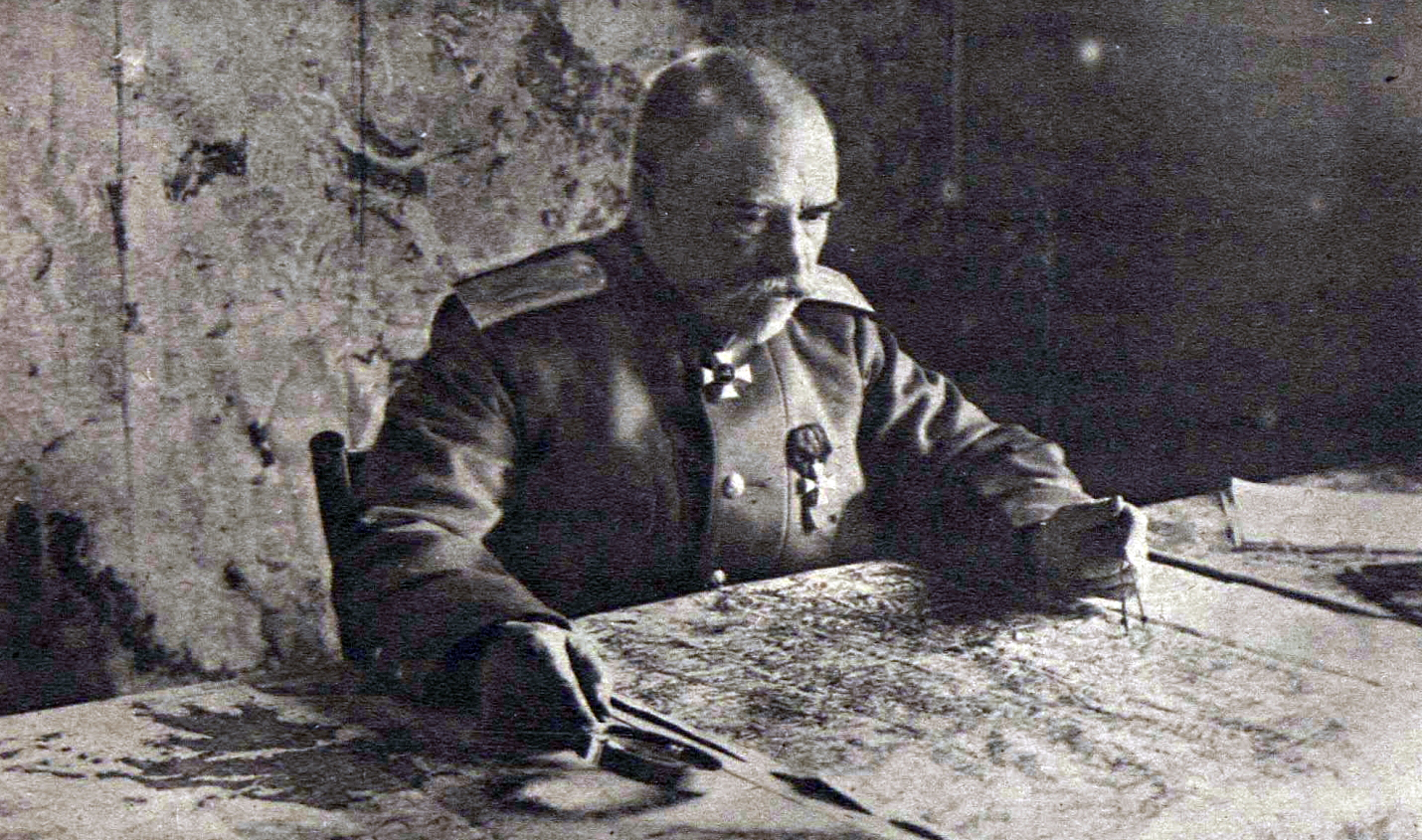 Генерал от кавалерии Сахаров Владимир Викторович